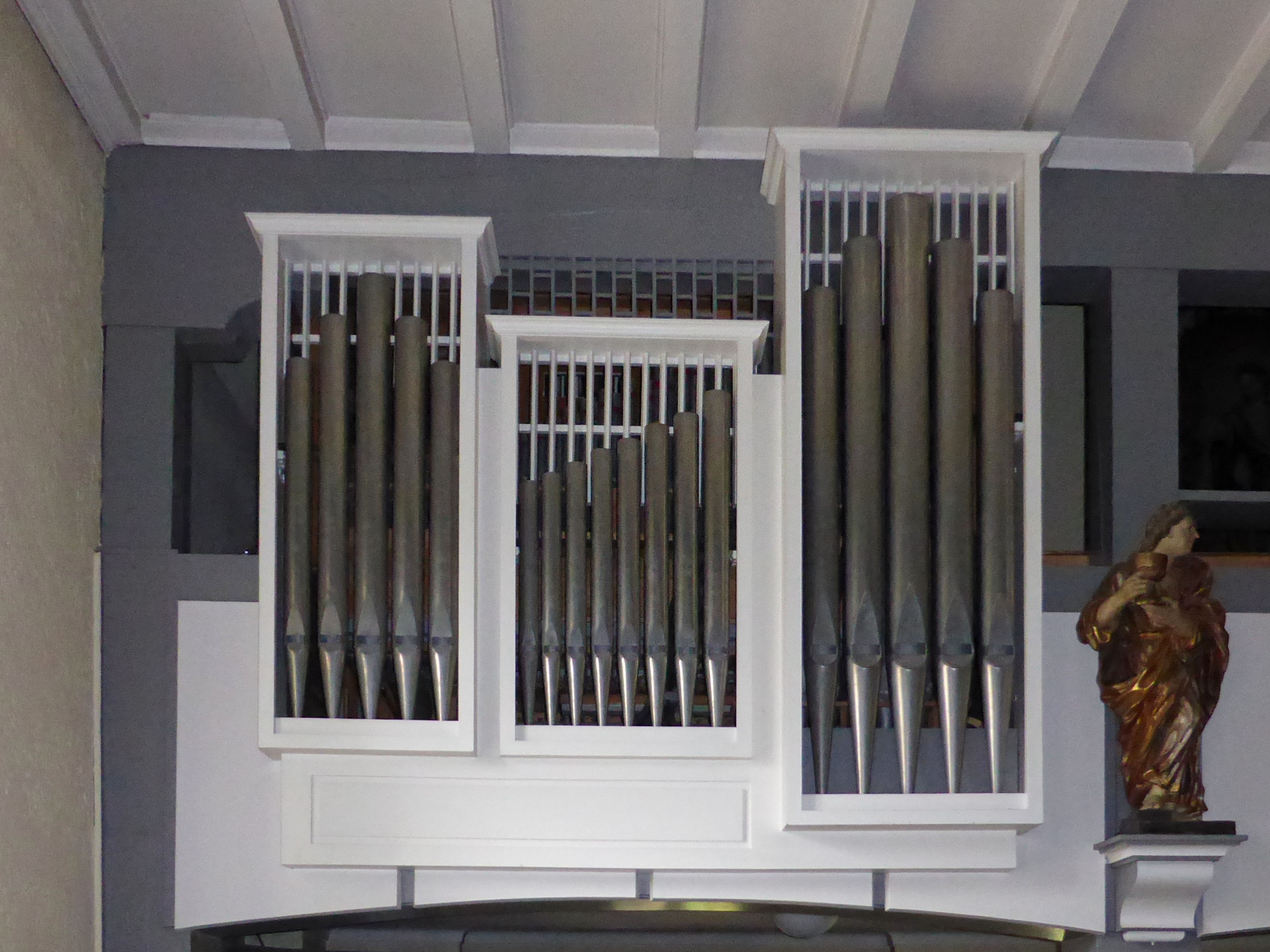 Orgel in der katholischen Hl.-Kreuz-Kirche in Dorstadt.